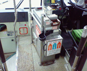 八戸市営バス：自動券売機機能付き運賃箱（三陽電機製作所 製）